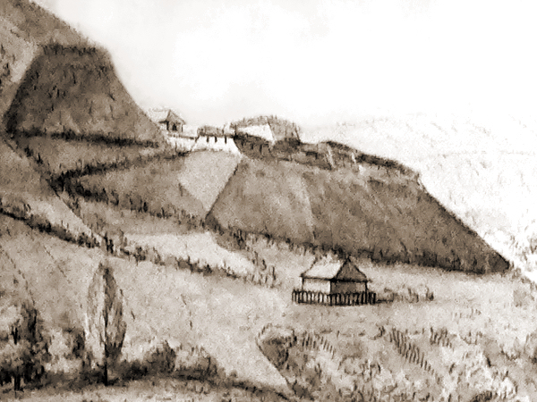 Fort 3 der Befestigungsanlagen auf dem Klüt